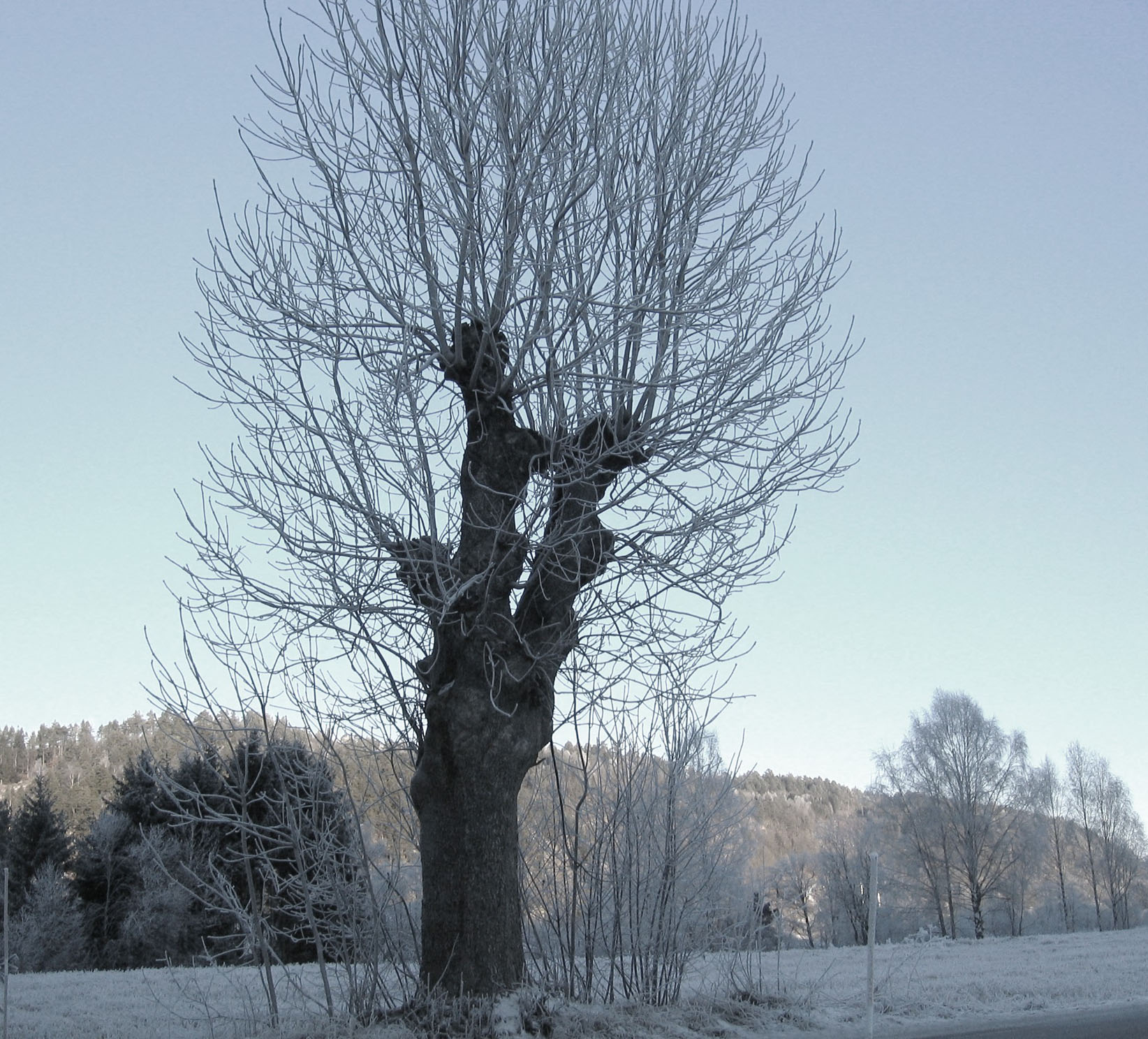 Kyllet asketre (fraxinus excelsior)